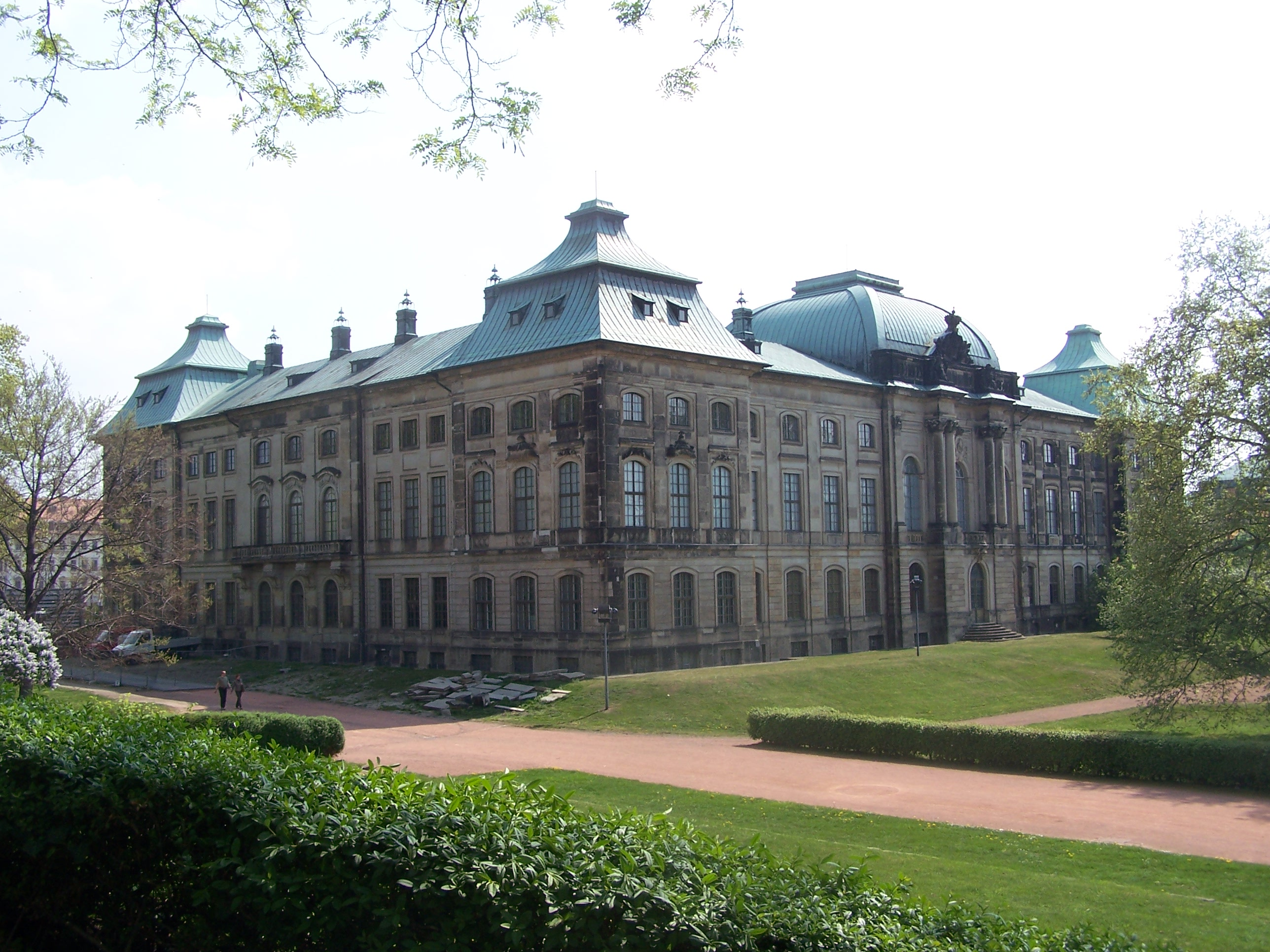 Das Japanische Palais in Dresden vom Park aus